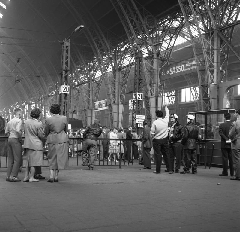 Stadtaufnahmen Frankfurt/Main Hauptbahnhof und Umgebung